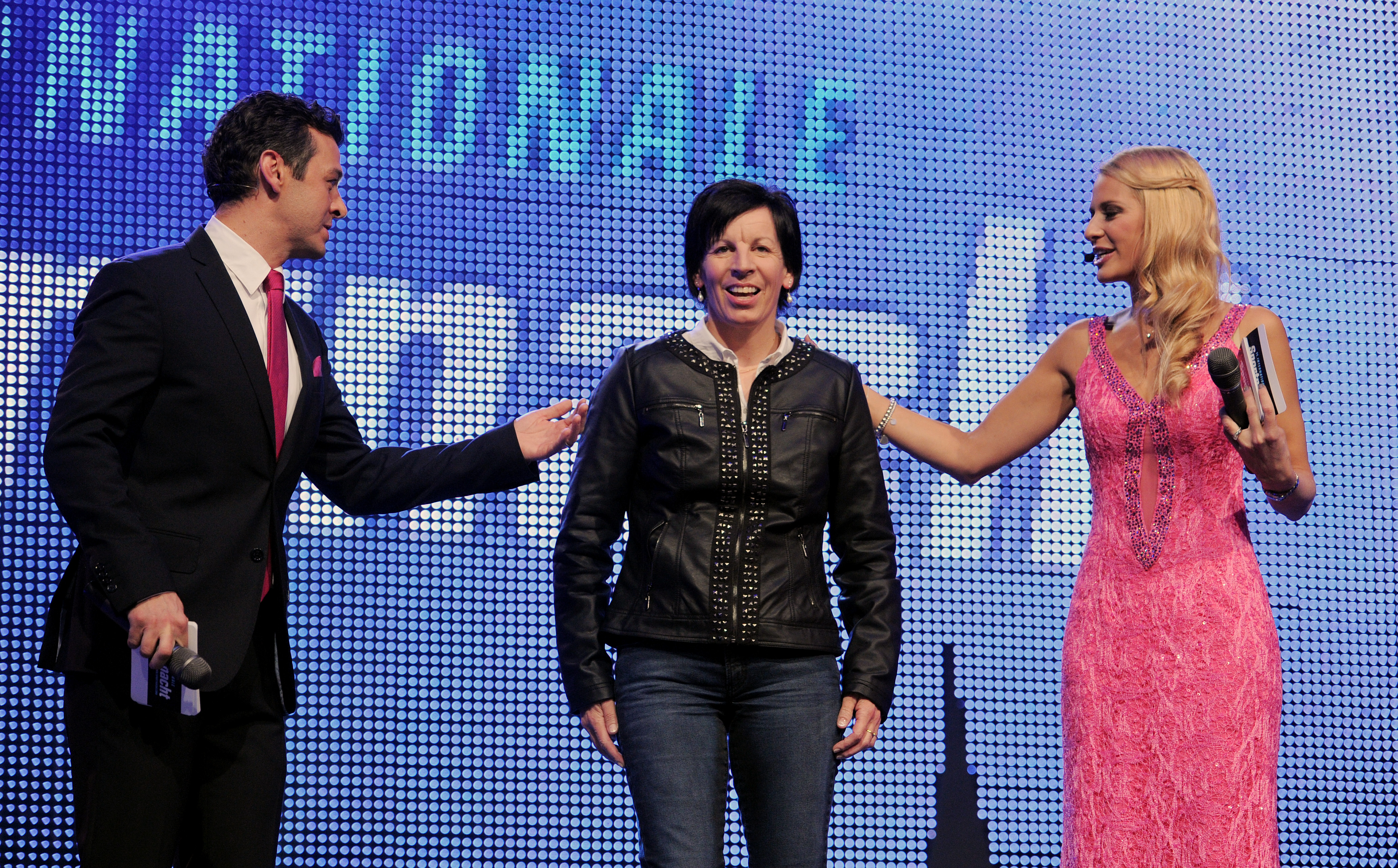 Davos, 15.11.2013. Sport, 11. Internationale Sportnacht Davos 2013. Die Moderatoren Jann Billetter und Christa Rigozzi befragen die ehemalige Skiweltmeisterin und Olympiasiegerin Vreni Schneider.. Copyright by: foto-net / Kurt Schorrer